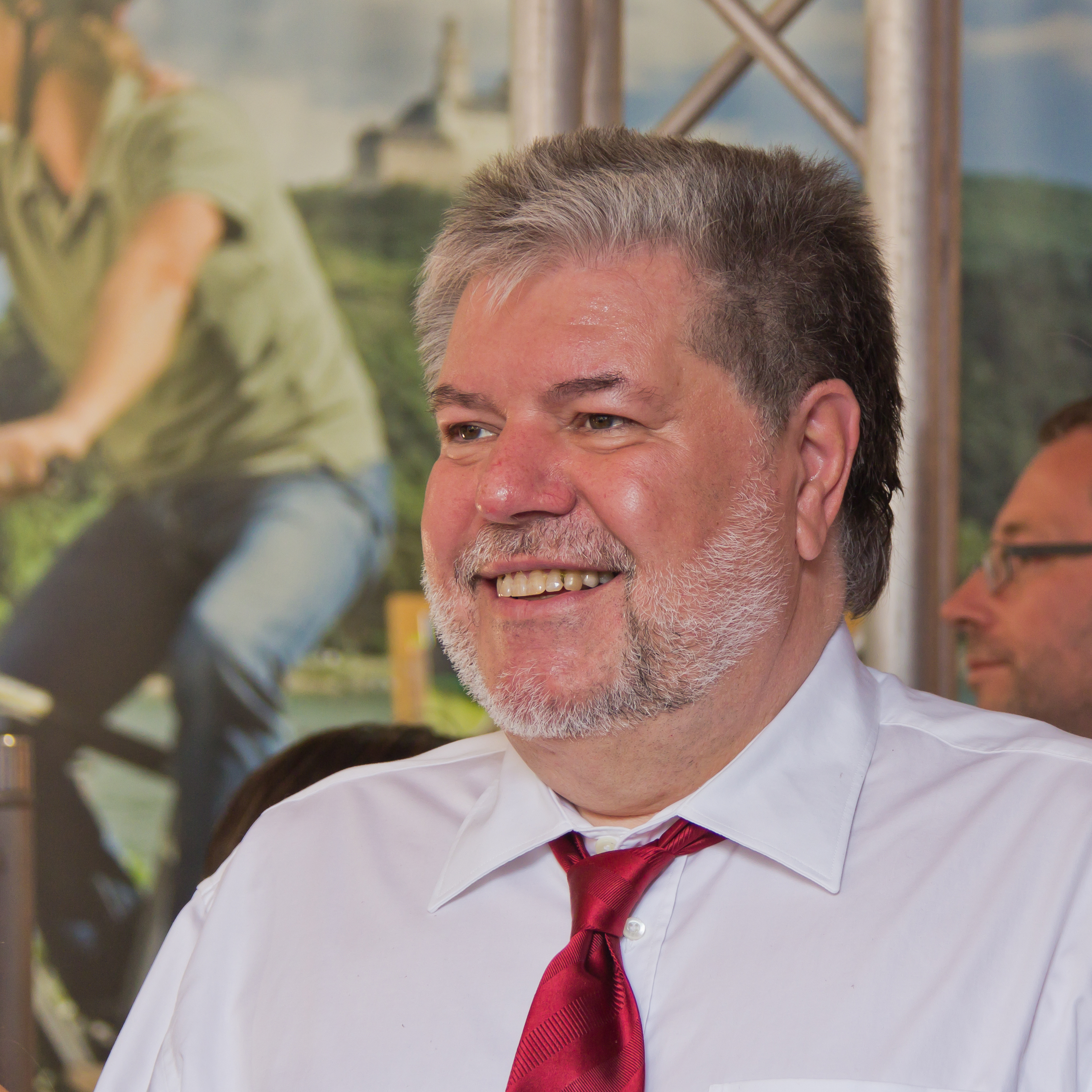 Deutschlandfest 2011 in Bonn: Kurt Beck, Ministerpräsident, auf dem Stand seines Bundeslandes Rheinland-Pfalz.